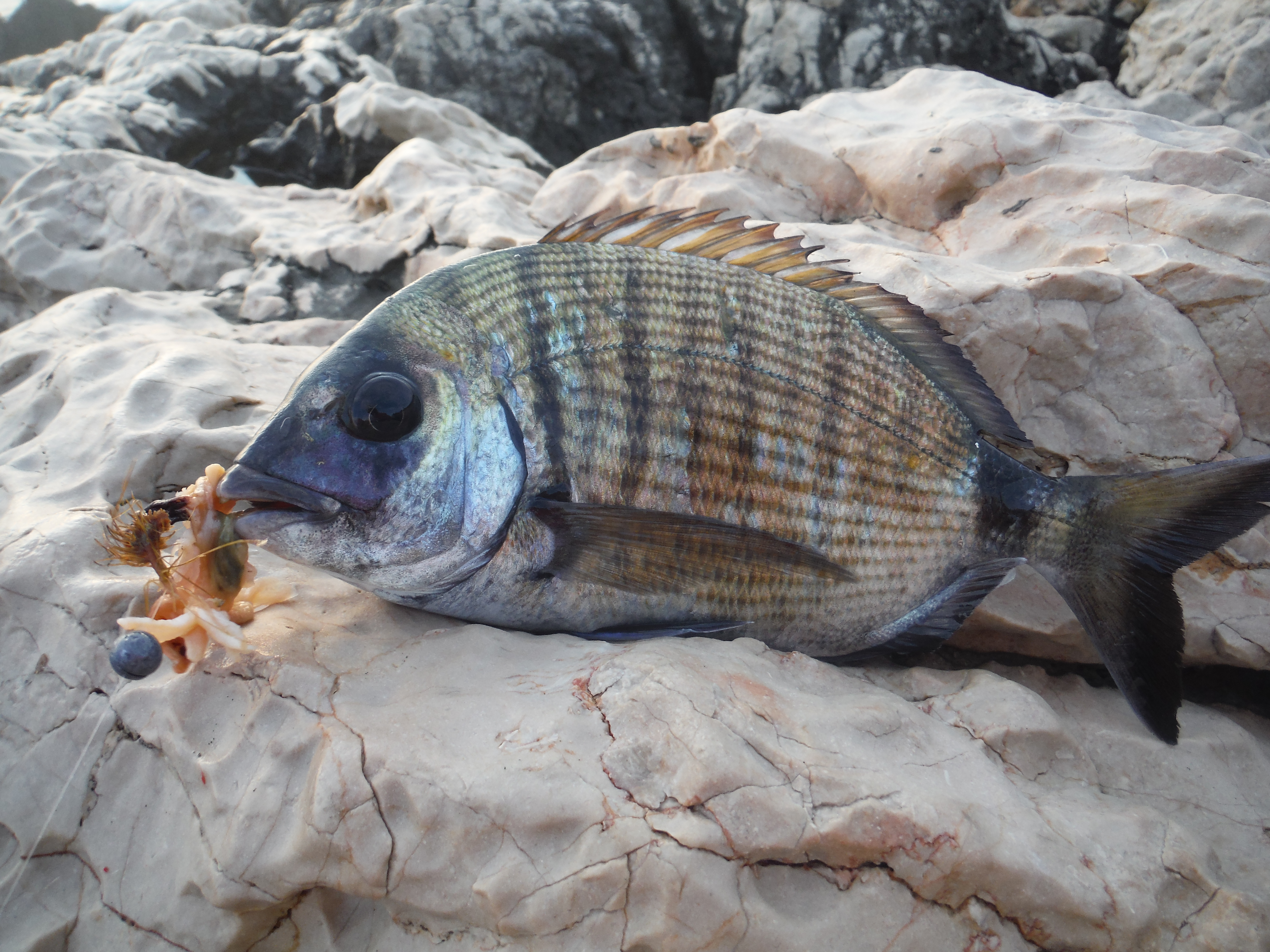 Sar commun capturé à la moule au toc